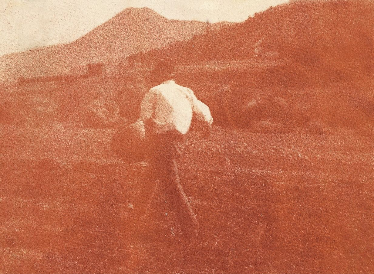 Sejalec